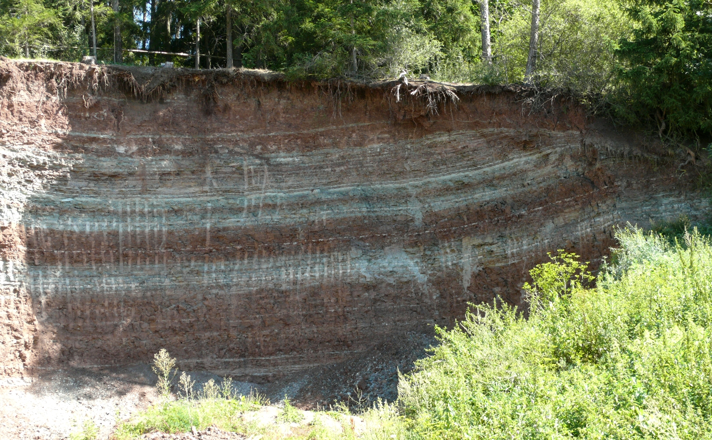 Lehrbergschichten, Steigerwald-Formation, Frankenhöhe